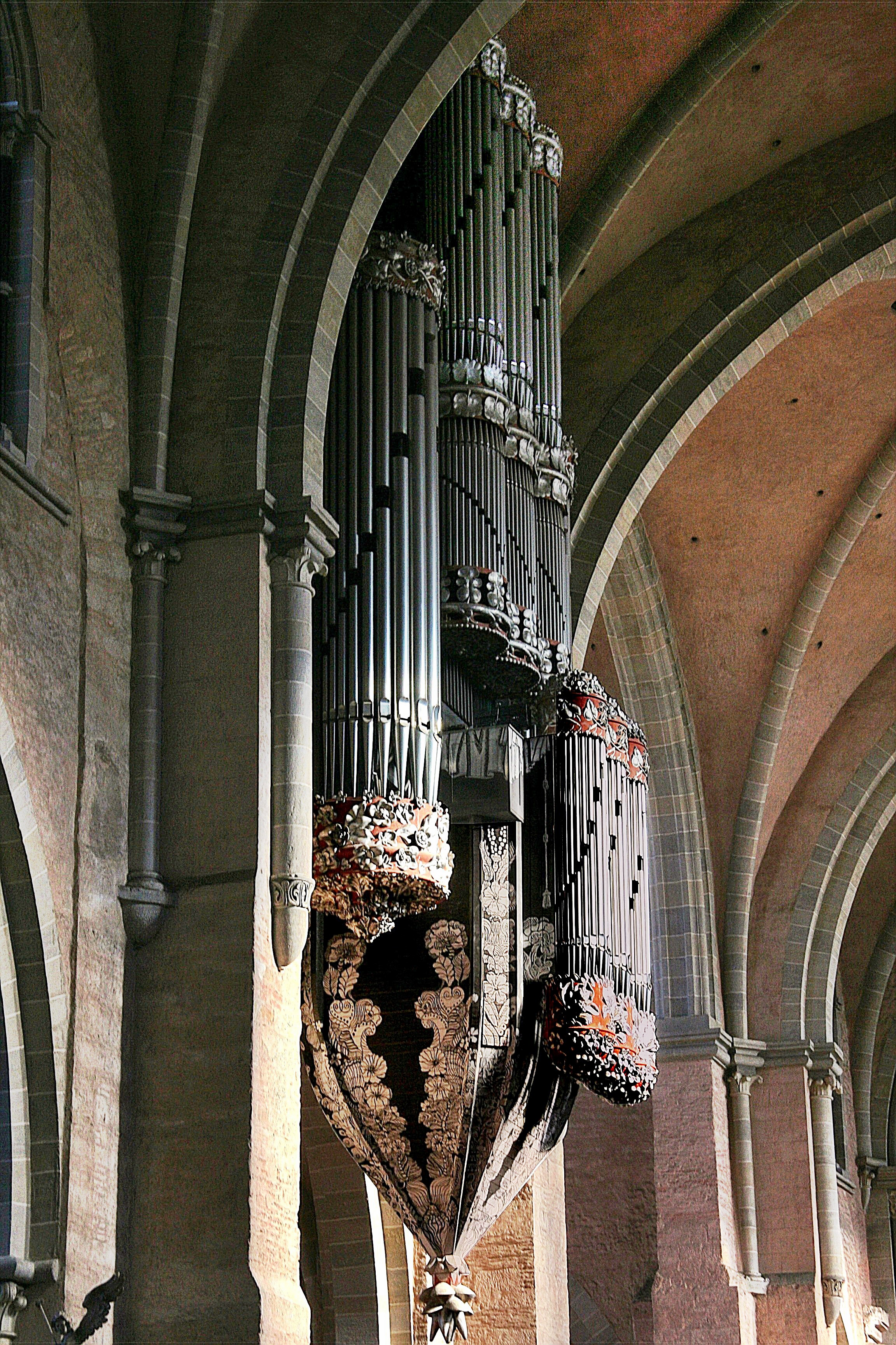 Hauptorgel im Trierer Dom (sog. Schwalbennestorgel), 1974 von der Orgelbauwerkstatt Johannes Klais gebaut